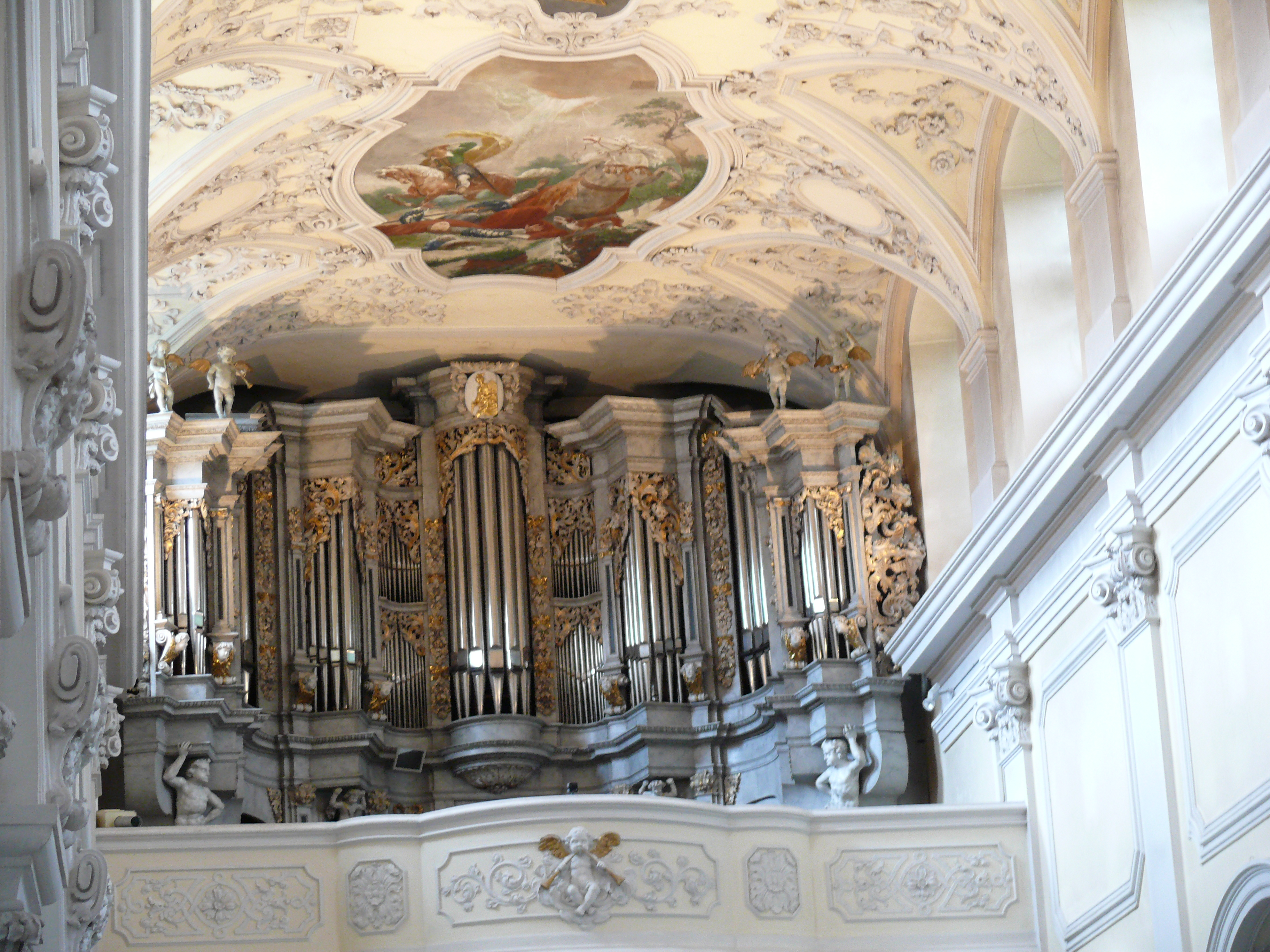 Kloster Oberzell, Zell am Main : Katholische Klosterkirche St. Michael : OrgelThis is a photograph of an architectural monument.